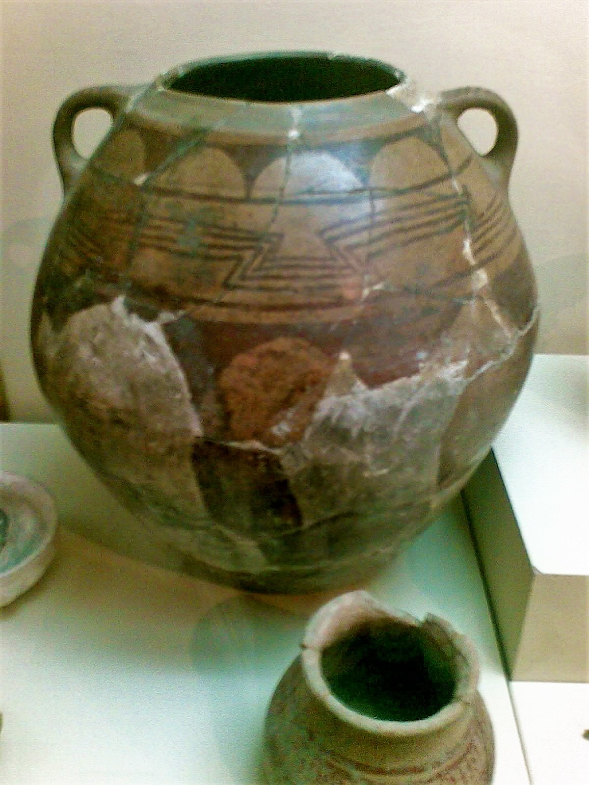 Qaraköbər yaşayış yerindən tapılmış saxsı qab (Azərbaycan Dövlət Tarix Muzeyi)